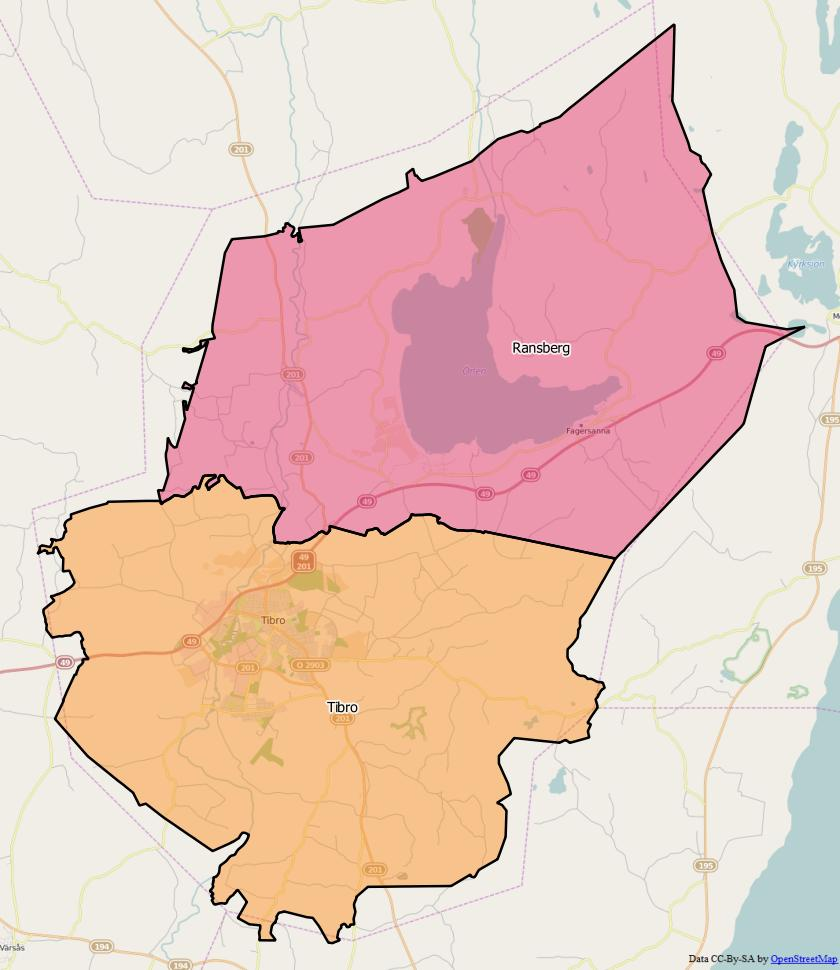 Distriktsindelningen i Tibro kommun World file: 48.59664024400918692 0 0 -48.59664024400918692 1563384.55900779366493225 8087206.34488216135650873